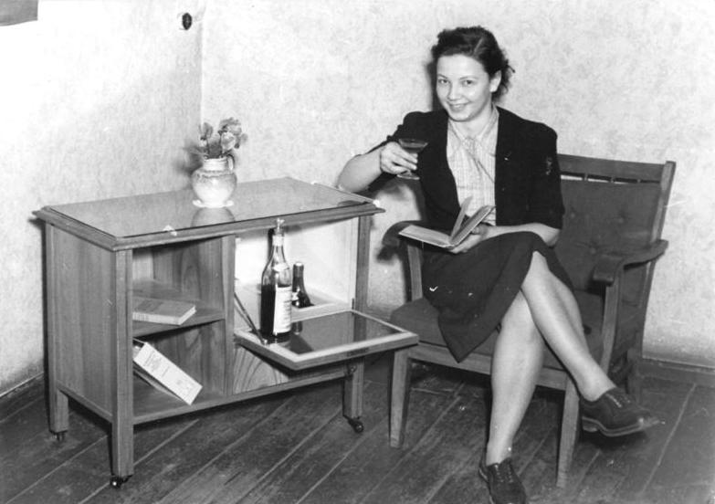 Berlin, Möbelfabrik, Teewagen Zentralbild Junge 2.3.1954 Berliner Betriebe produzieren zusätzlich Massenbedarfsgüter 100 Teewagen, 1000 Heuharken und 500 Schweißgeräte stellt der volkseigenen Betrieb Kabinenbau, Berlin N4, Chausseestraße 34, zusätzlich her. Bis auf die Beschläge werden nut Materialreste verwandt. UBz: Kollegin Melitta Tenner an einem Teewagen.